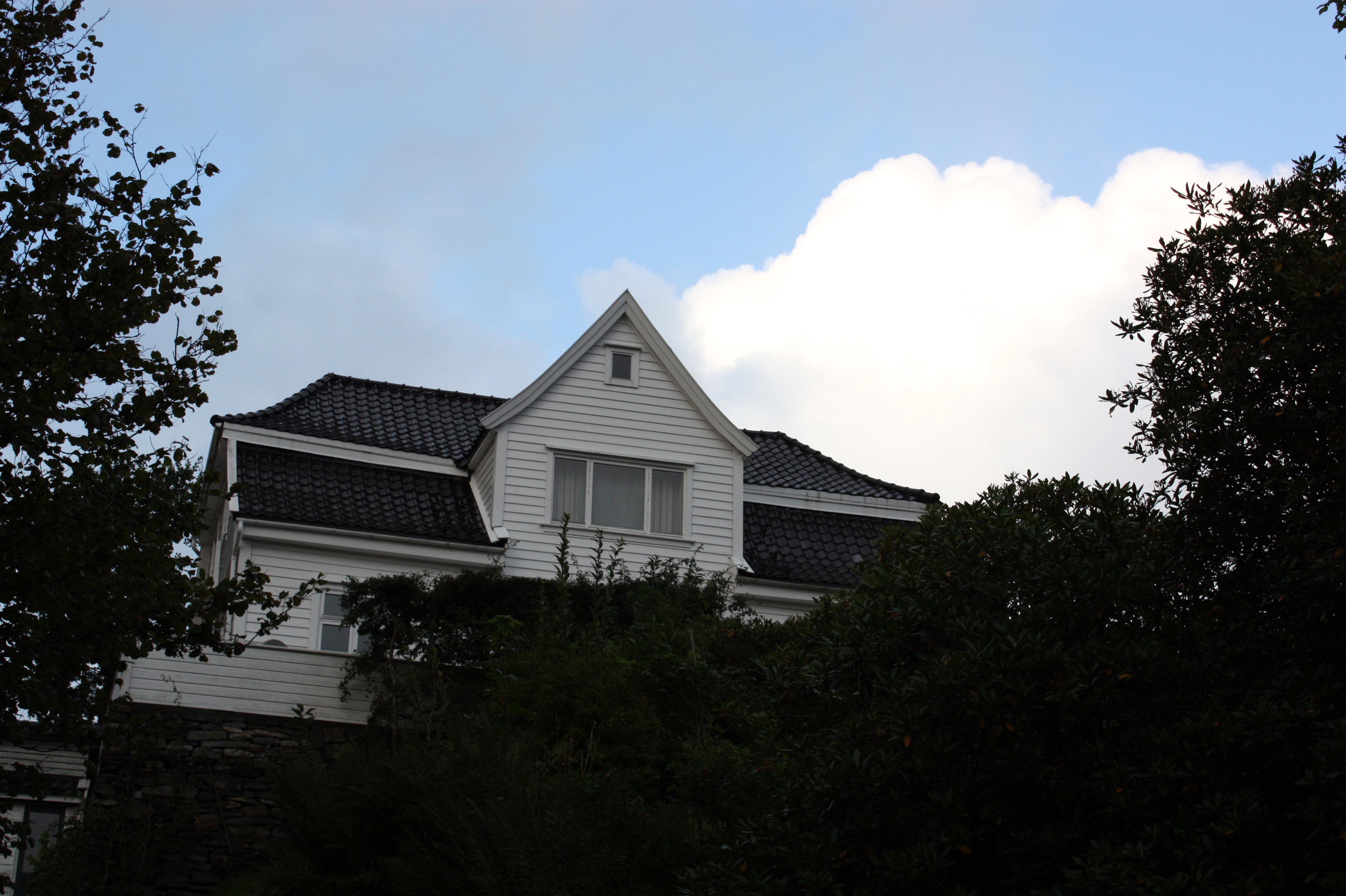 Nøysomheten 19, Fana, Bergen.